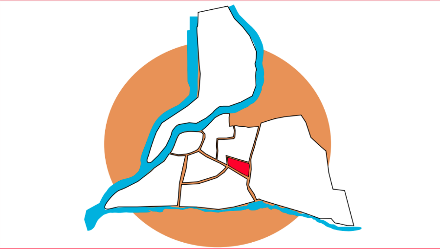 Emplacement du quartier de Saint-Chamand sur la carte d'Avignon.